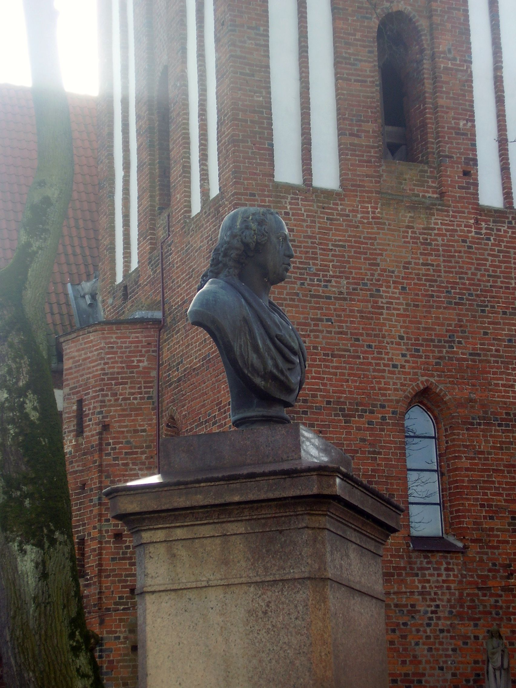 Pomnik J.G.Herdera